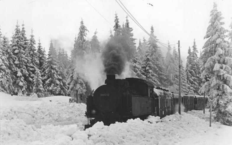 Dampflok 99 6012 (BR 99), Brockenbahn Zentralbild Biscan 14.1.1953 Ein Geschenk der Eisenbahner an unsere Jugend. Für die Dauer der I. Bezirks-Wintersportmeisterschaften der Jungen Pioniere und Schüler in Schierke Mitte Januar 1953 hat die Brocken-Bahn ihren traditionellen Winterschlaf für fünf Tage unterbrochen. 5,4 Kilometer Schienenstrang mussten vom Schnee freigeschaufelt werden, damit die Bahn bis Schierke verkehren und die Jungen und Mädchen heranbringen kann. UBz: ein ungewohntes Bild: Zwischen hohen Schneewällen keucht die Brockenbahn den Berg hinan.